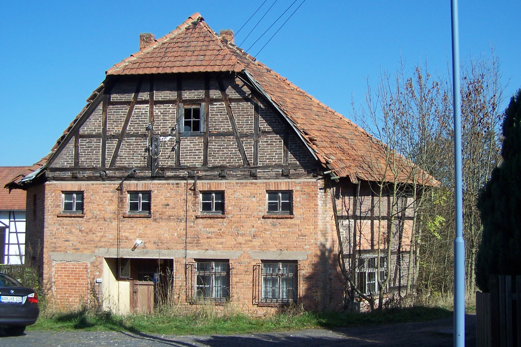 Von der ehemaligen Gutsanlage am Nordrand der Ortschaft Hausbreitenbach blieben nur wenige Gebäude erhalten, zu ihnen gehört diese umgebaute Scheune.